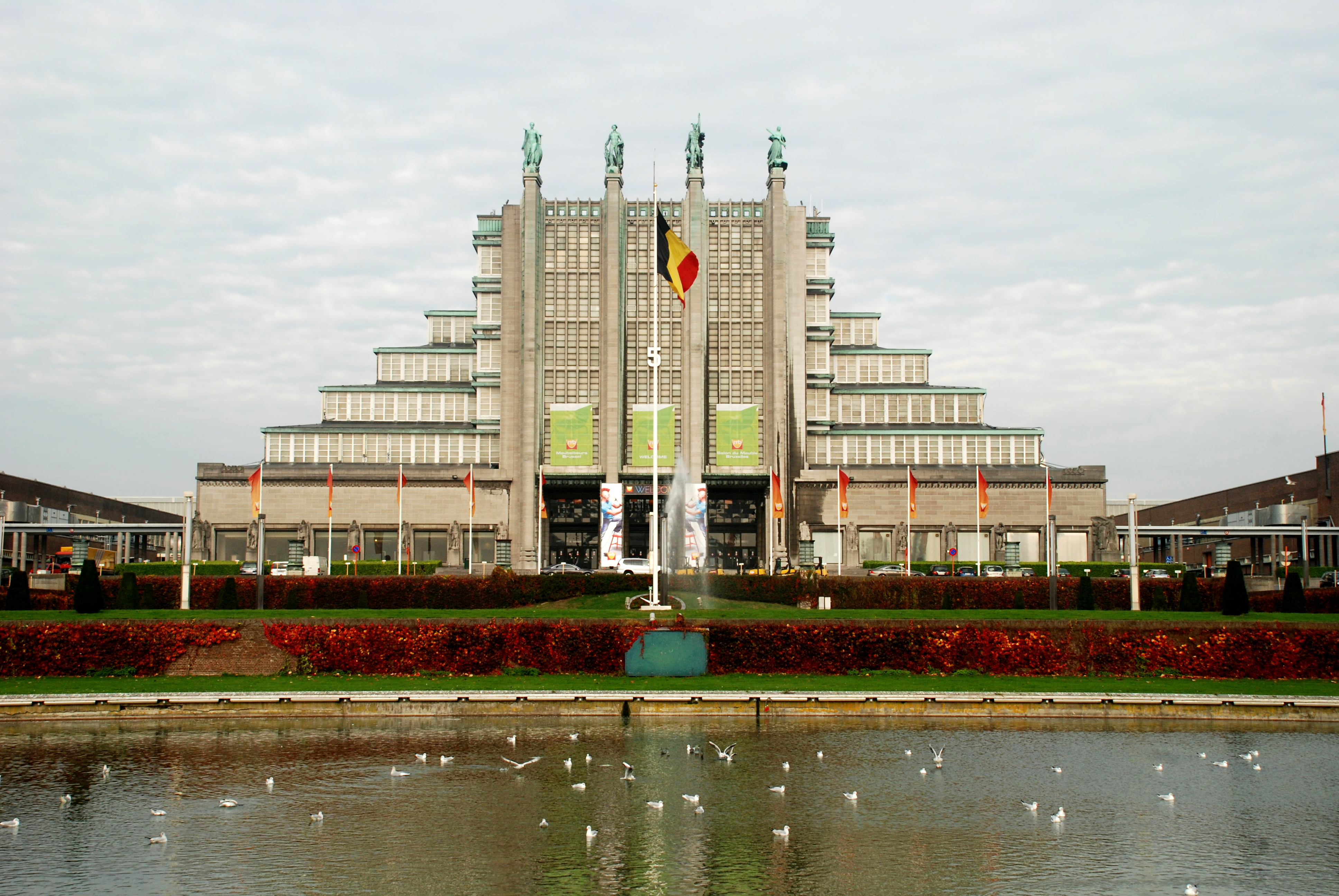 Belgique - Bruxelles - Palais 5 du Heysel (architecture monumentale - architecte Joseph Van Neck - 1933-1935)